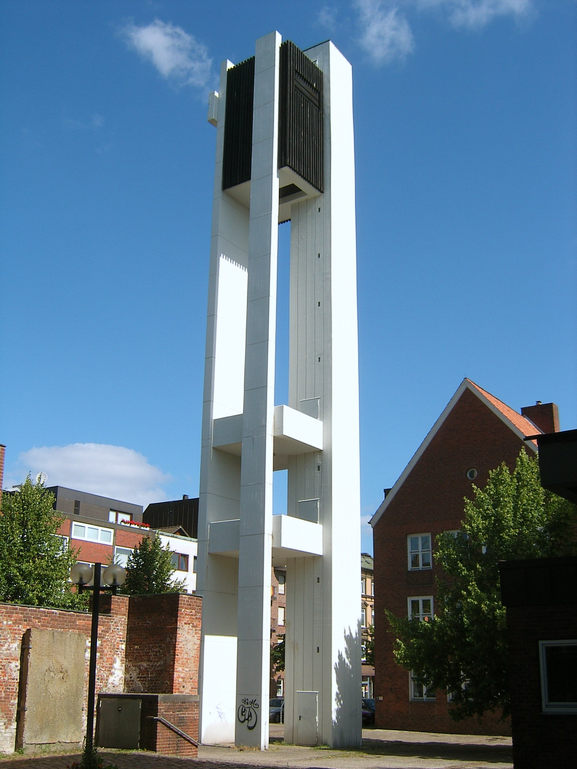 Turm der Dreifaltigkeitskirche in Hamburg-Harburg.